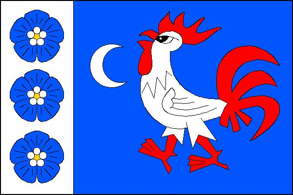 Vlajka obce Zábrodí